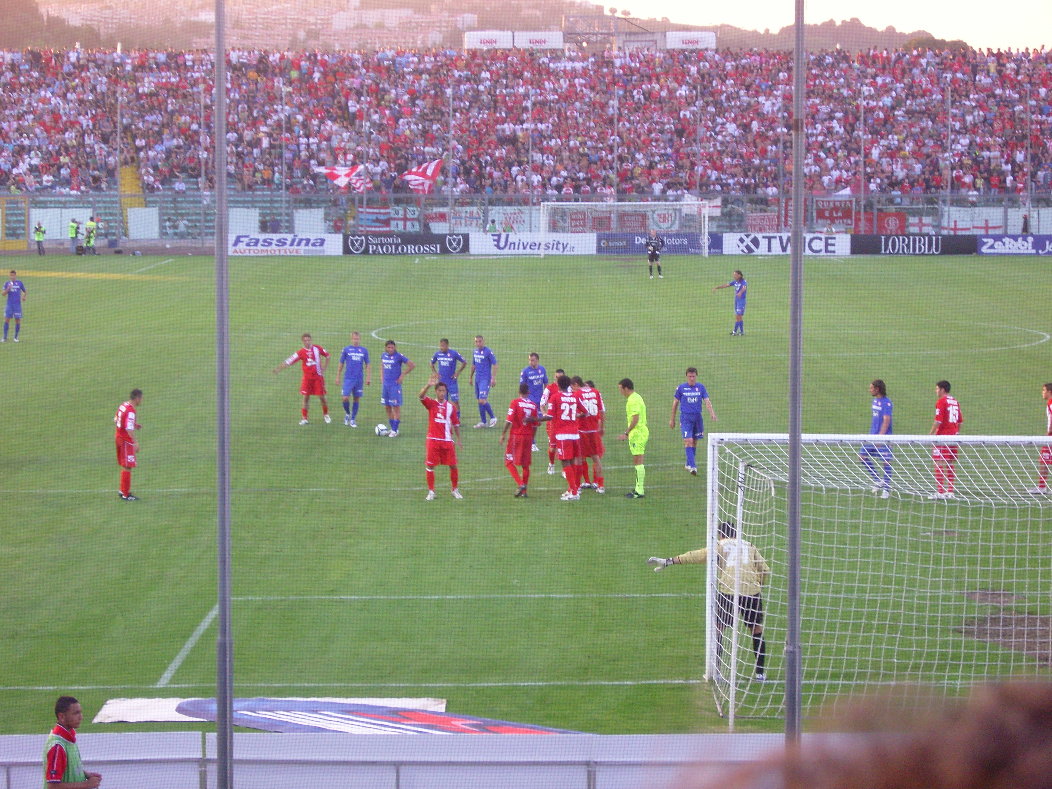 Punizione in favore del Rimini Calcio nella gara dei playout di serie B Ancona-Rimini, poi terminata 1-1. Anconetani in maglia biancorossa, riminesi con la divisa blu da trasferta. Stadio Del Conero di Ancona.